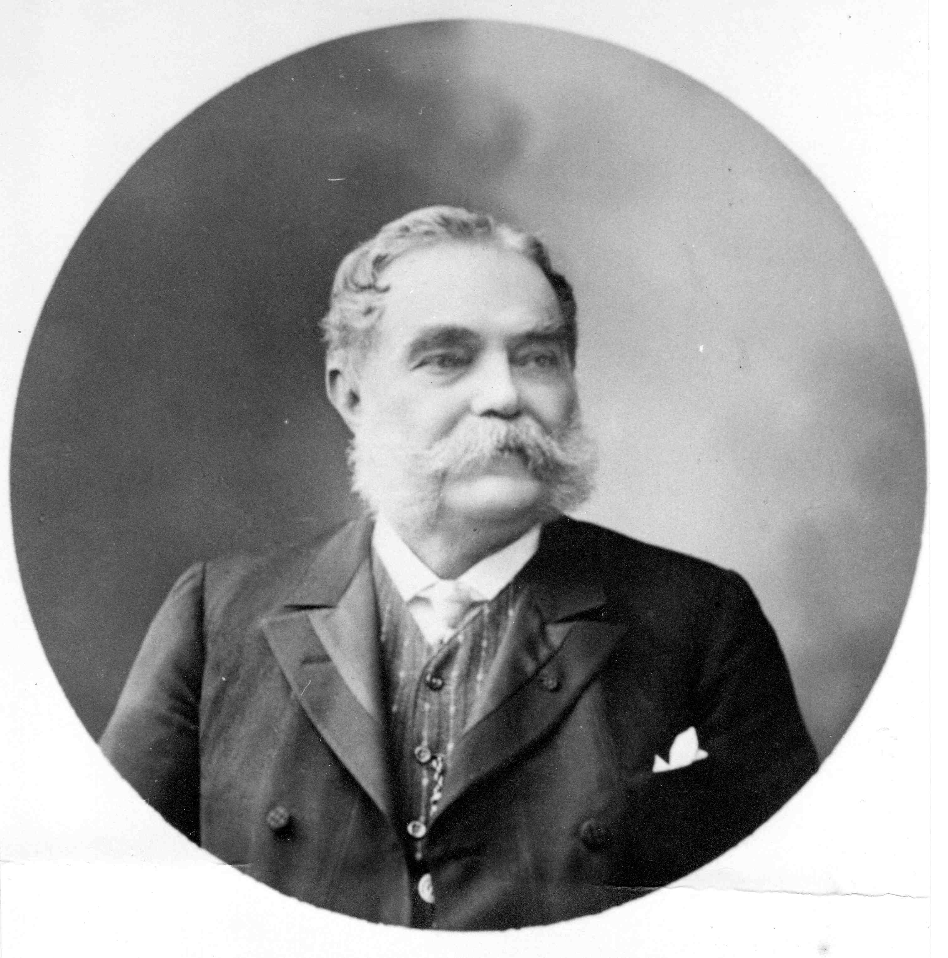 Alexandre Liautard, vétérinaire, doyen de l'American Veterinary College, à New York